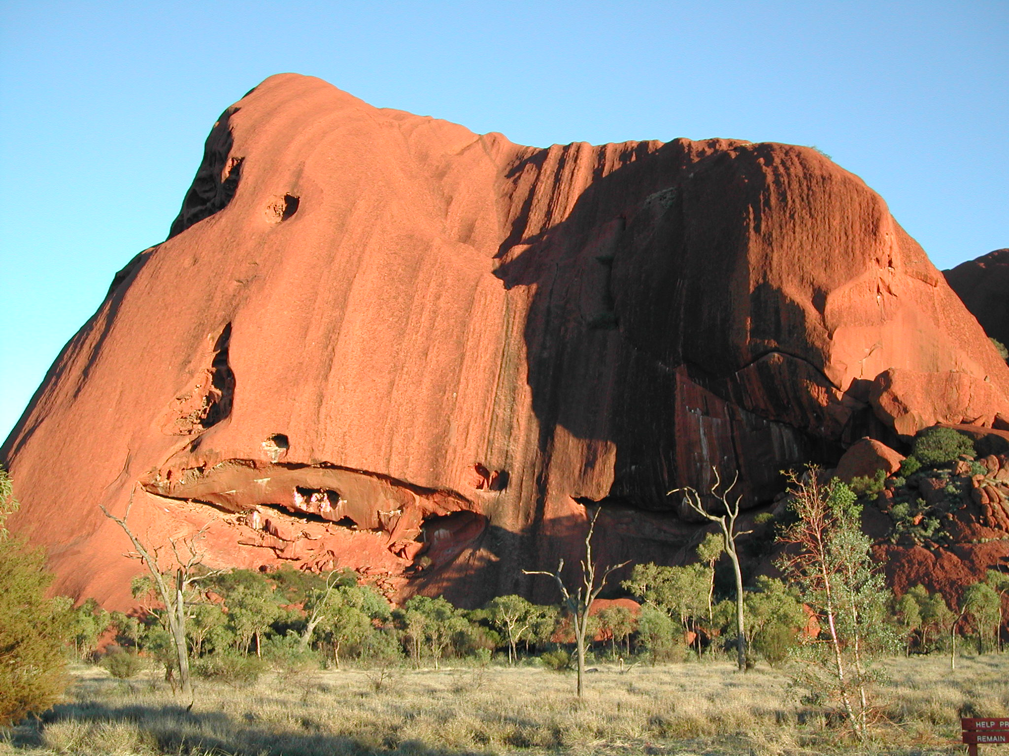 Den Ayers Rock vun enger anerer Säit.